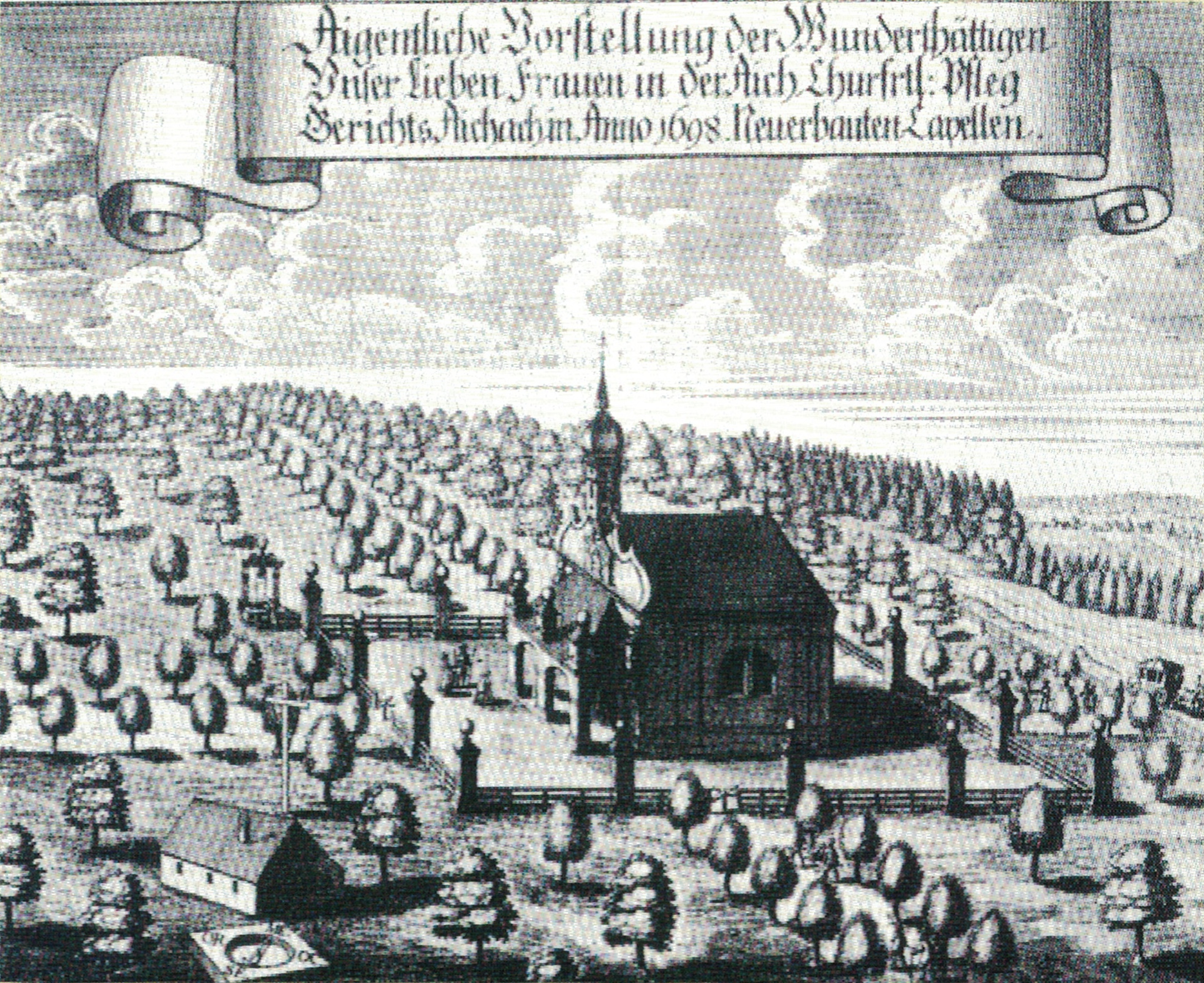 Maria Aich bei Oberbernbach; Kupferstich von Michael Wening kurz nach Erbauung 1698